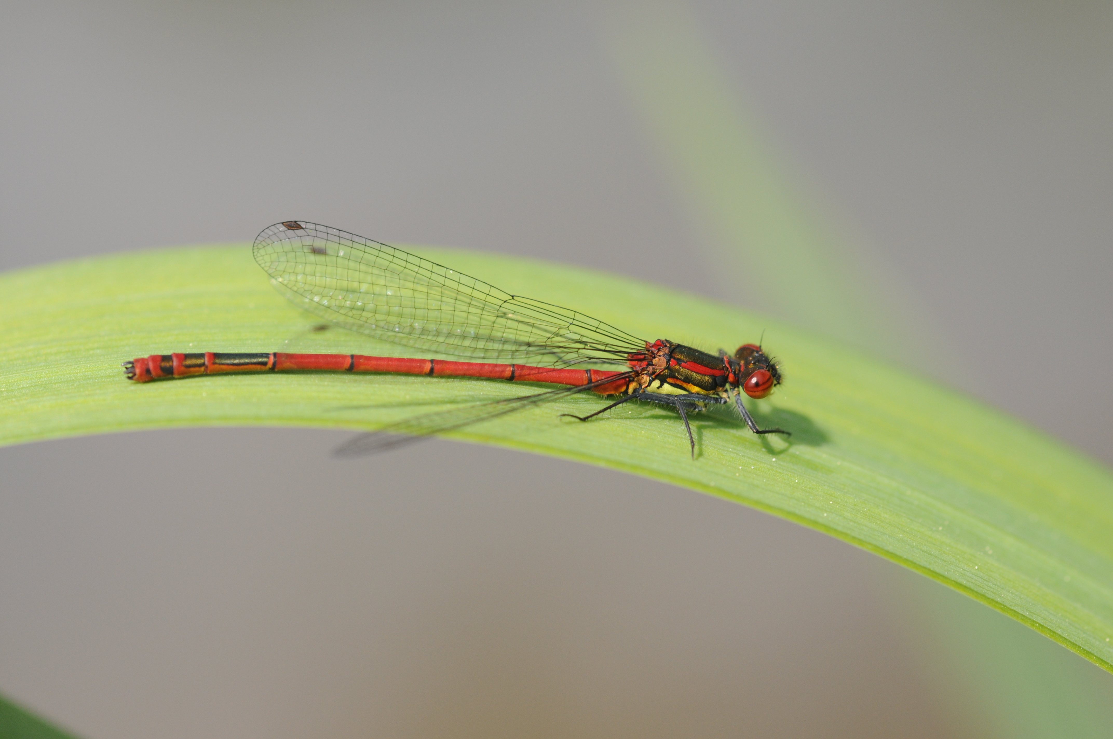 Petite nymphe au corps de feu